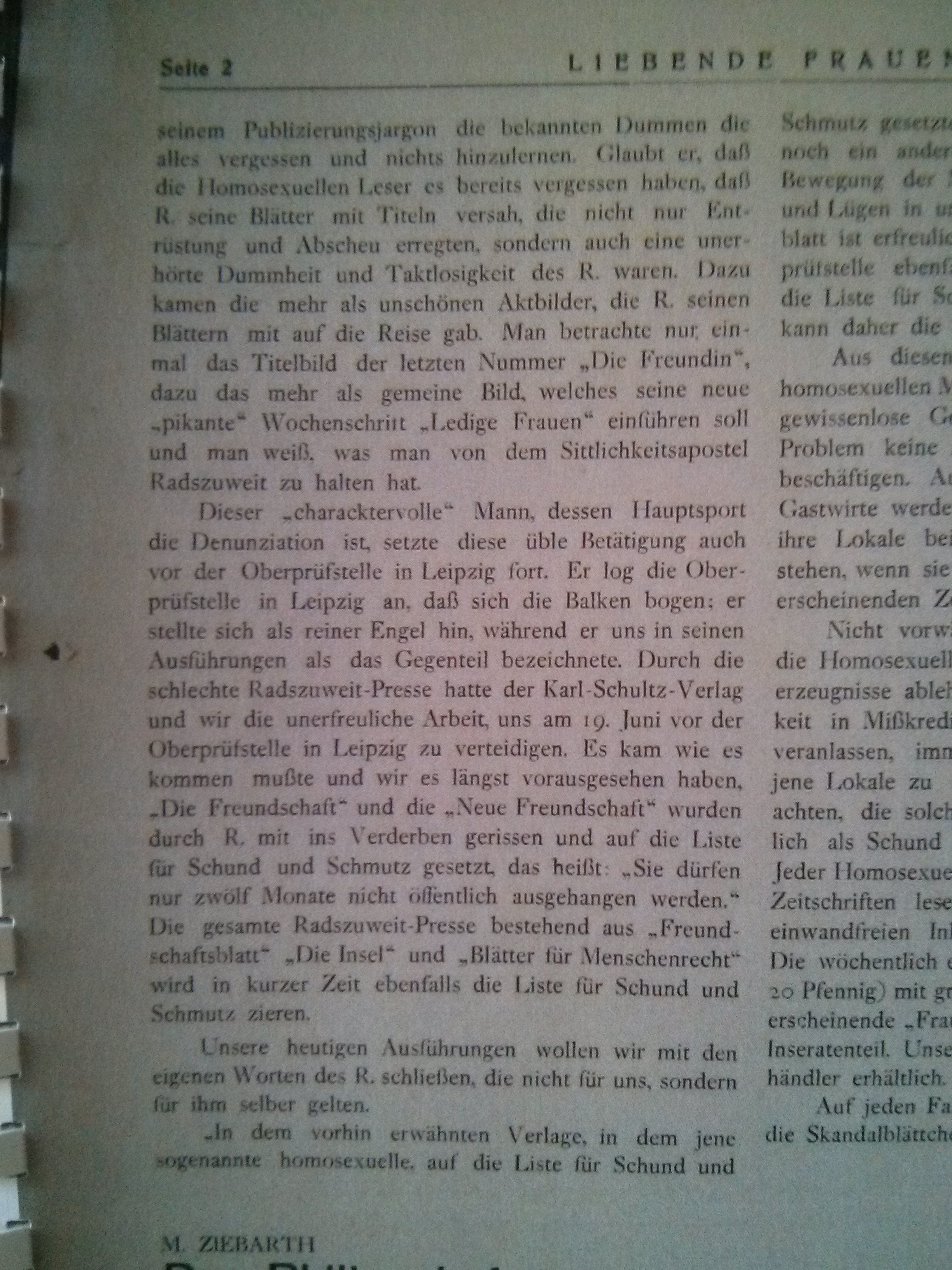 Aus der lesbischen Zeitschrift "Liebende Frauen", Berlin, 1928, Ausschnitt Seite 2 Ausgabe 27